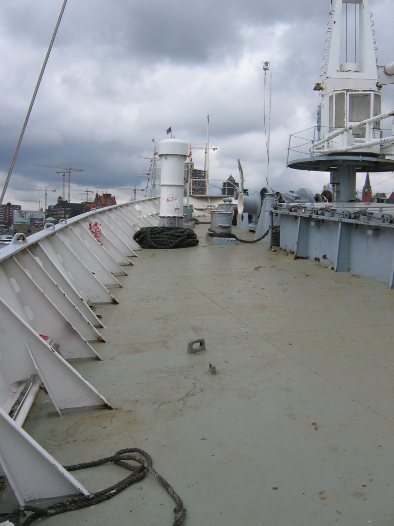 Nadburcie MS Cap San Diego